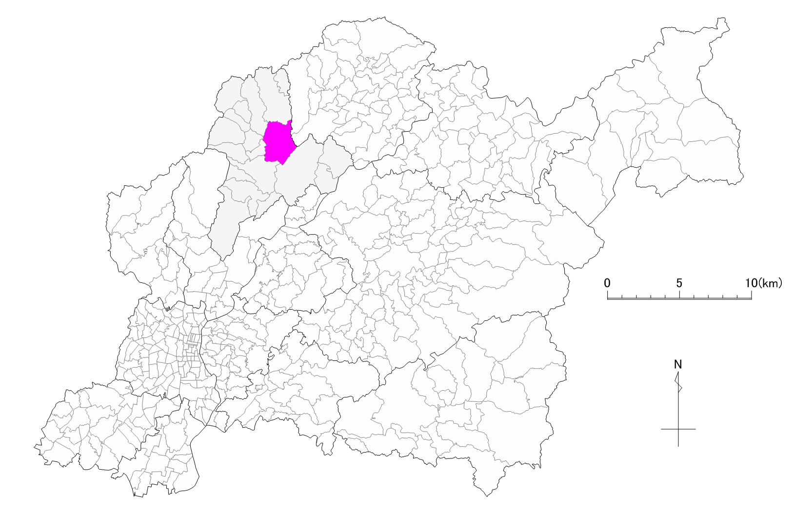 豊田市木瀬町位置図